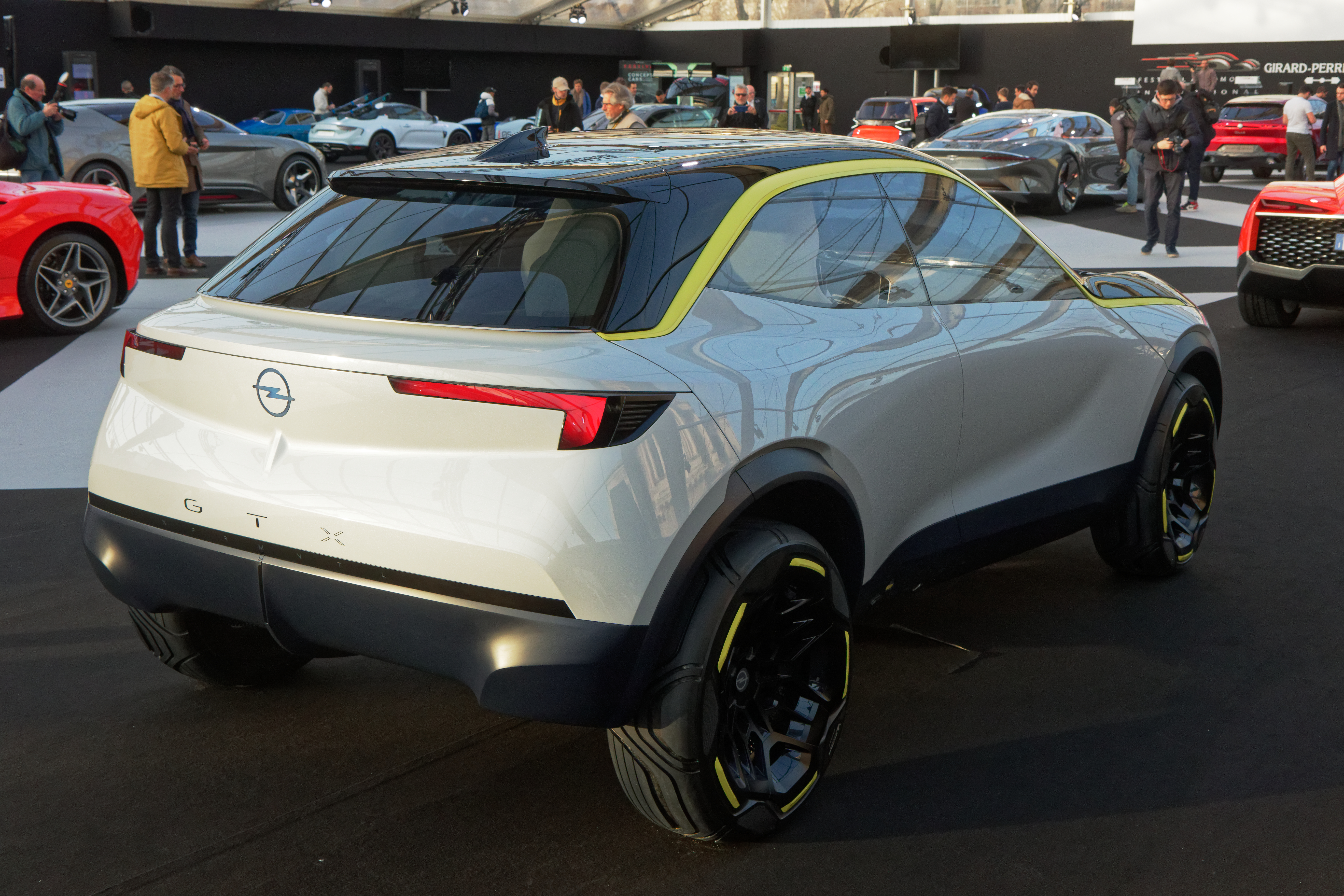 Une Opel GT X exposée lors du festival automobile international 2020